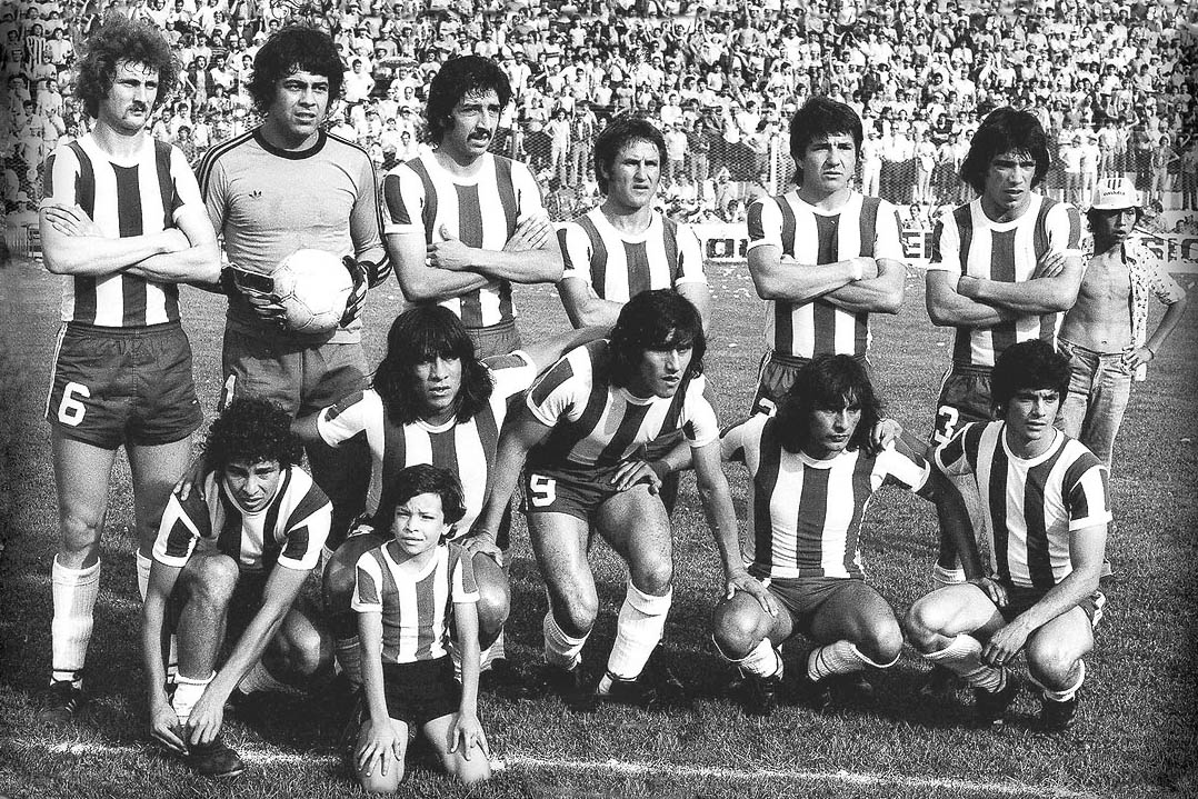 Equipo de Talleres de Córdoba.